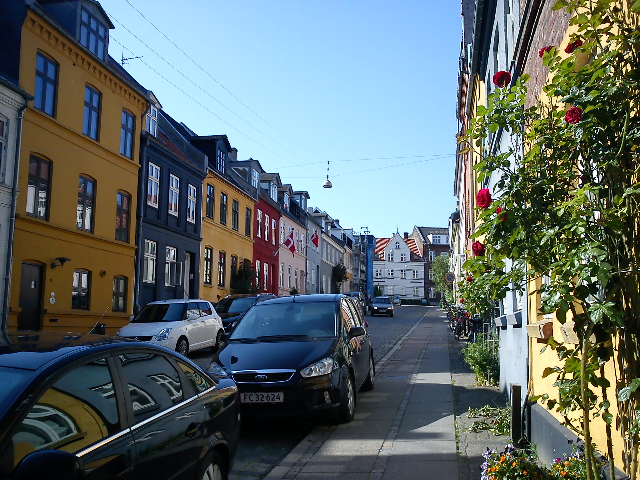 Typisk gade i Øgadekvarteret i Aarhus.